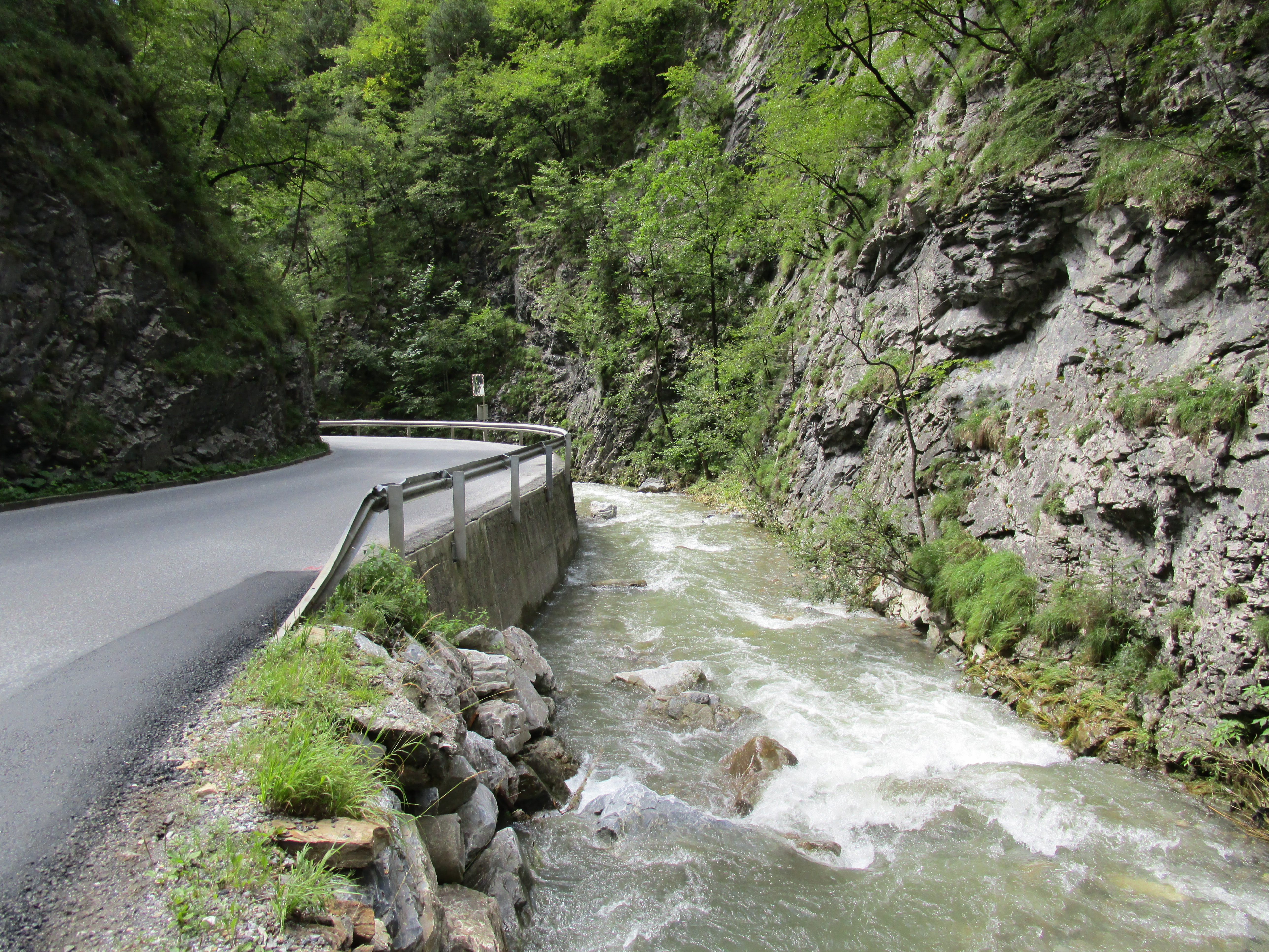 Rechberg Straße (B64) und Weizbach in der Weizklamm